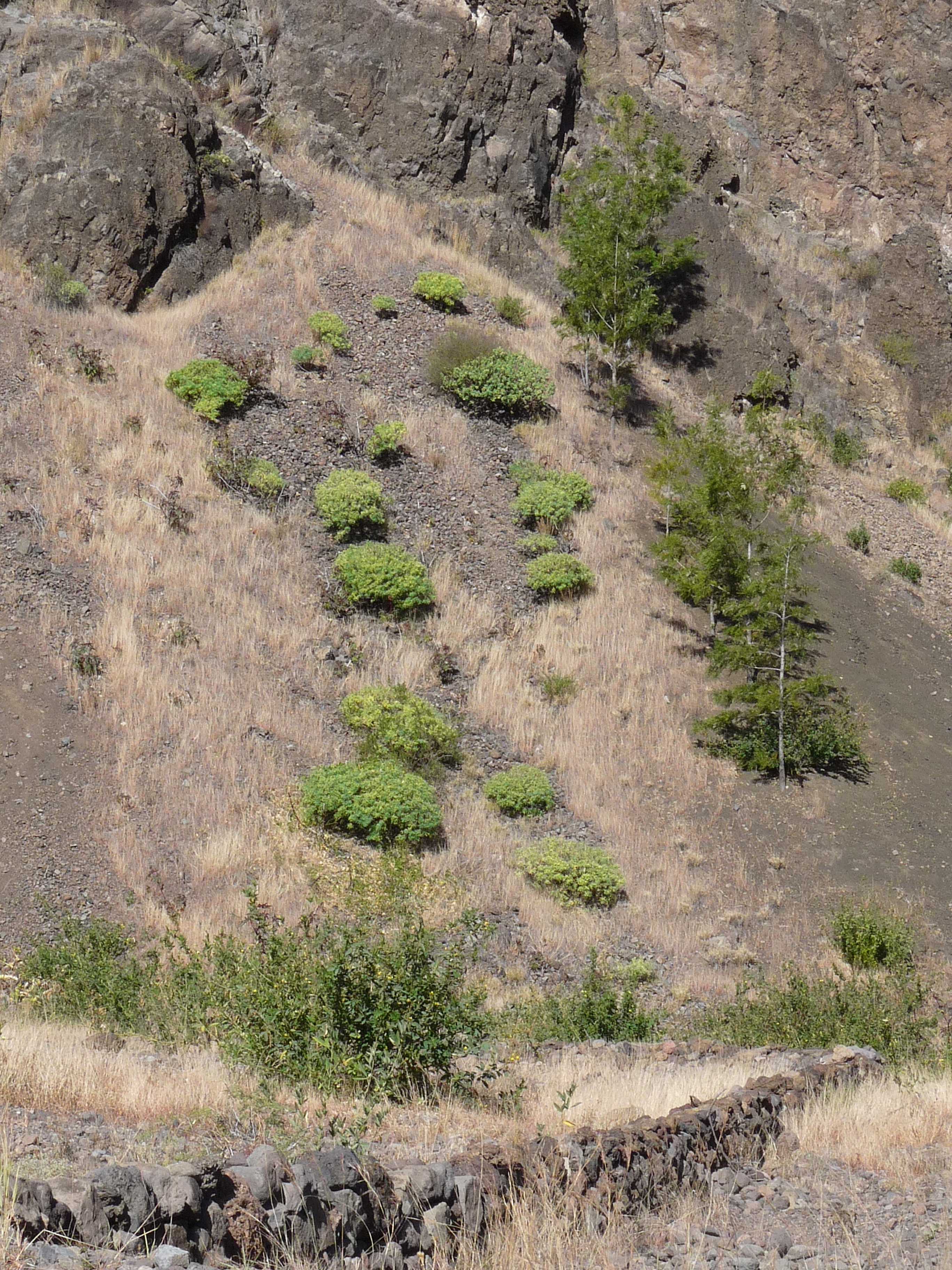 Chã das Caldeiras (île de Fogo, Cap-Vert) : Euphorbia tuckeyana, plante endémique